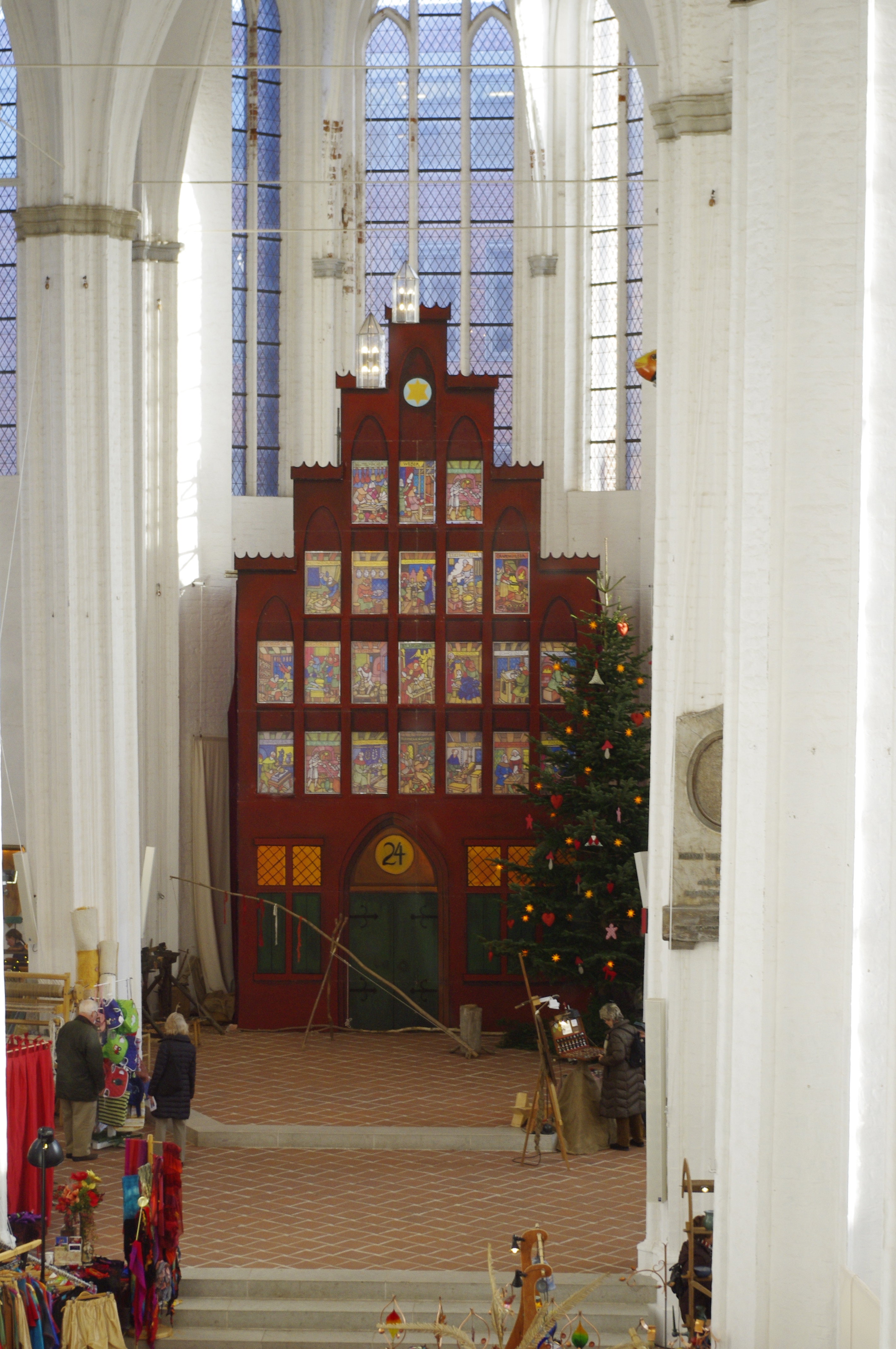 Sankt Petri mit Adventskalender, Lübeck während des Weihnachtsmarktes 2011.